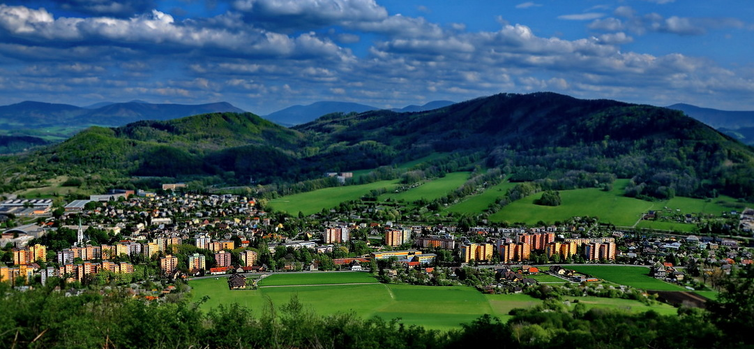 Pohled na Kopřivnici zpod rozhledny na Bílé hoře